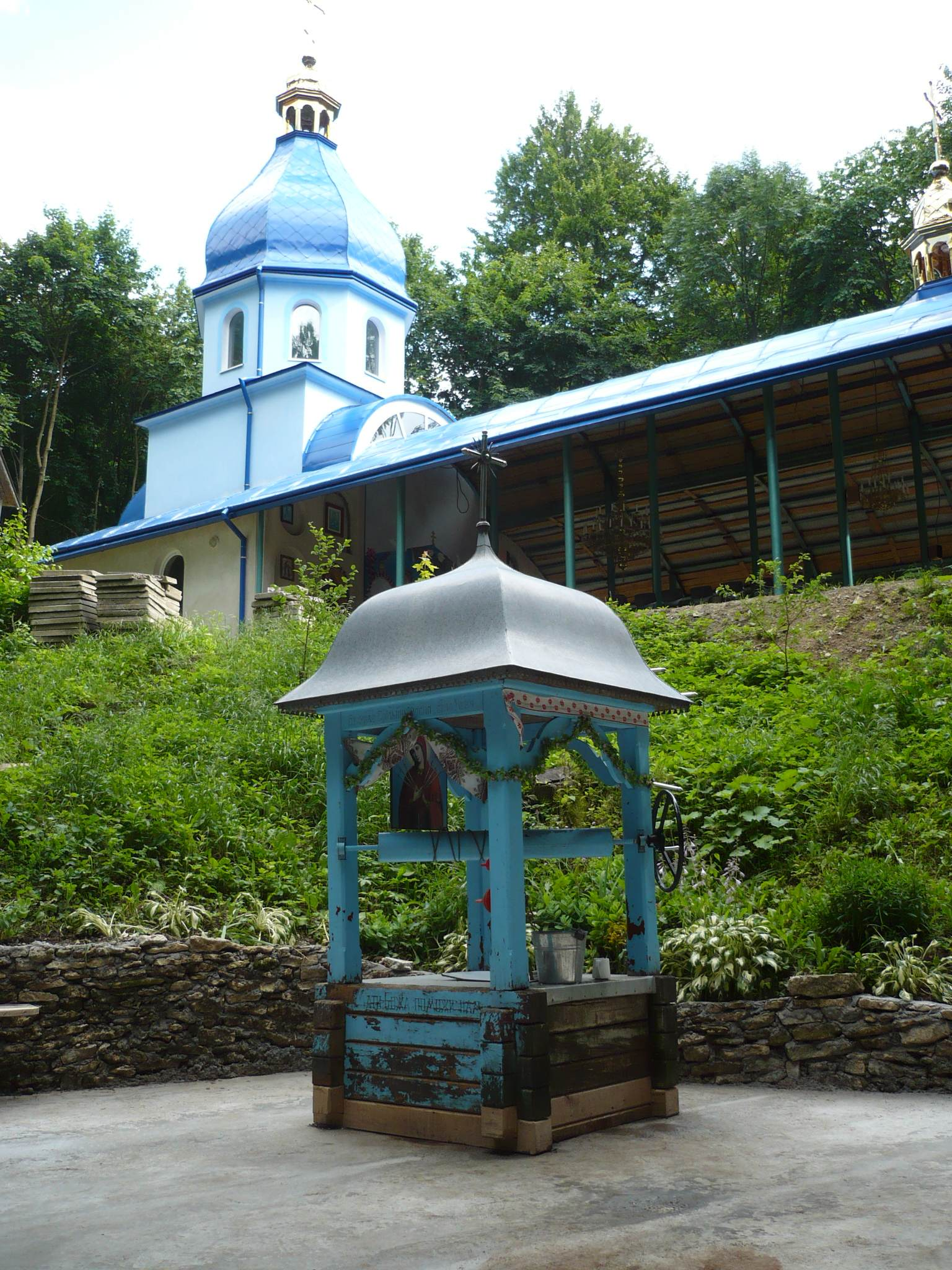 Czeremosznia, kaplica na Świętej Górze